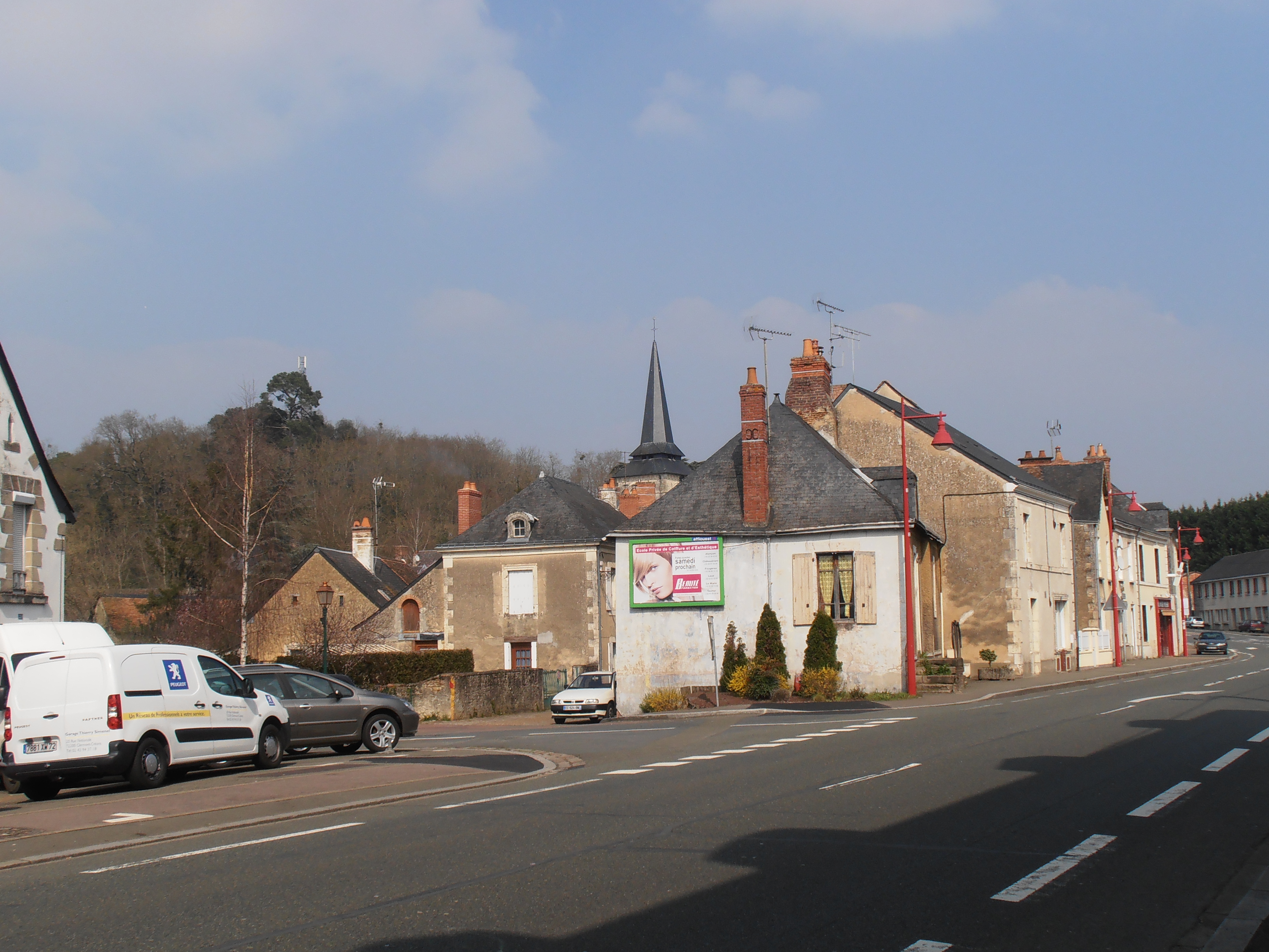 Vue de Clermont depuis la RD 323.